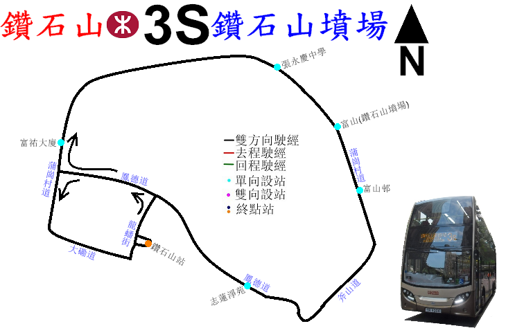 中文（香港）: 九巴3S線的走線圖